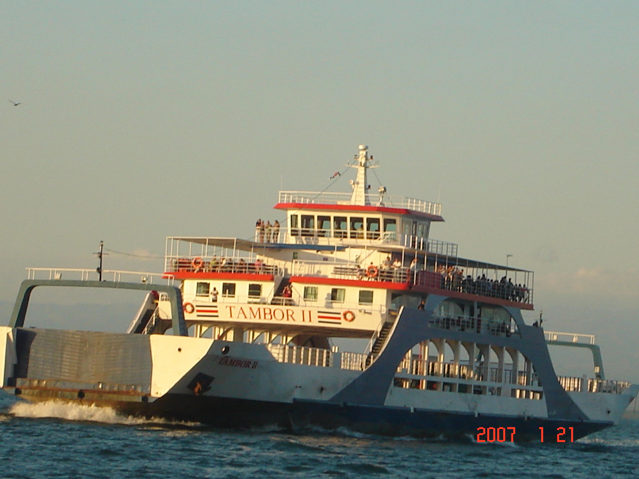 Ferri Tambor en el Golfo de Nicoya, Costa Rica